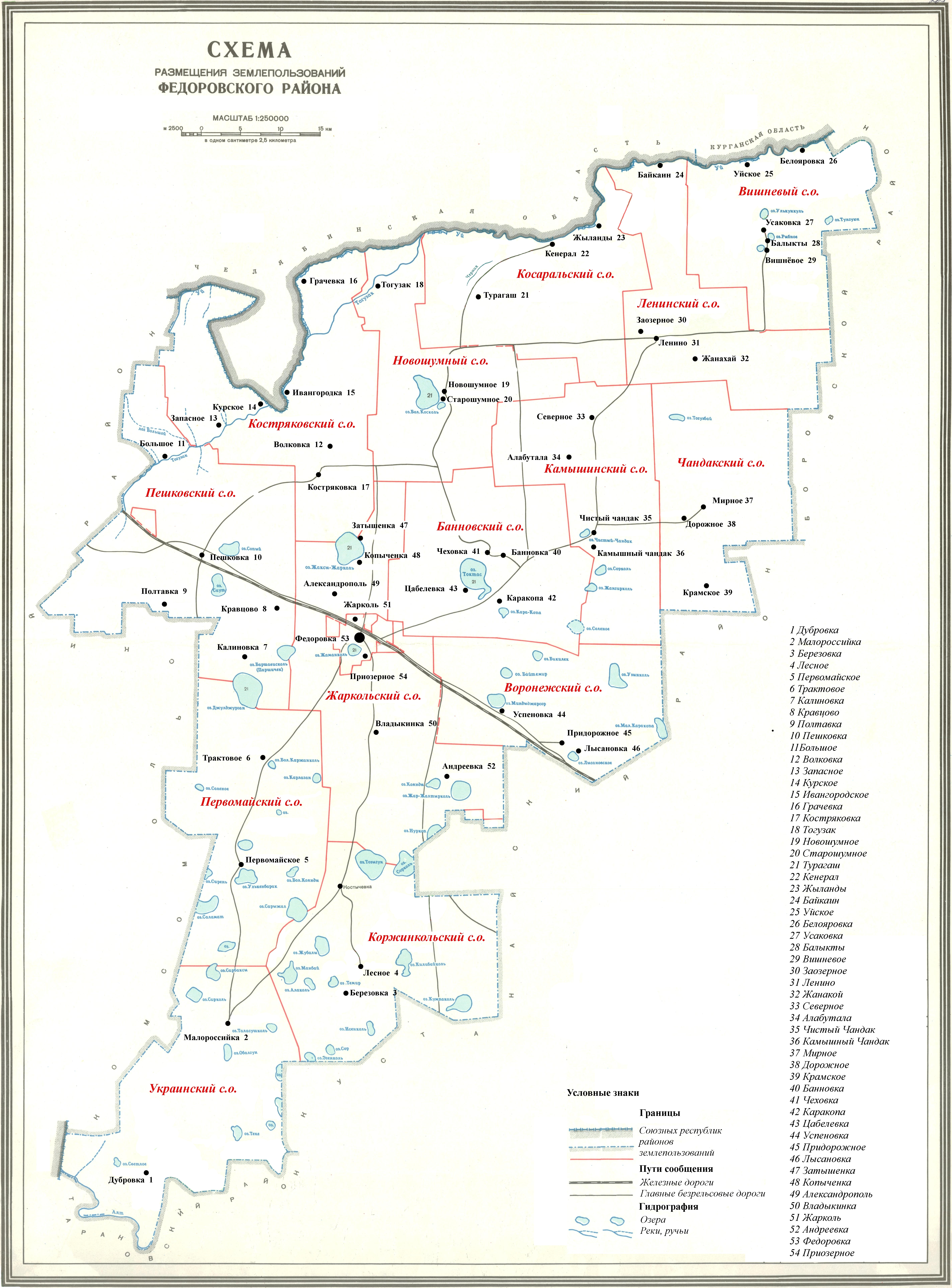 Генплан Федоровского района 2011 год.